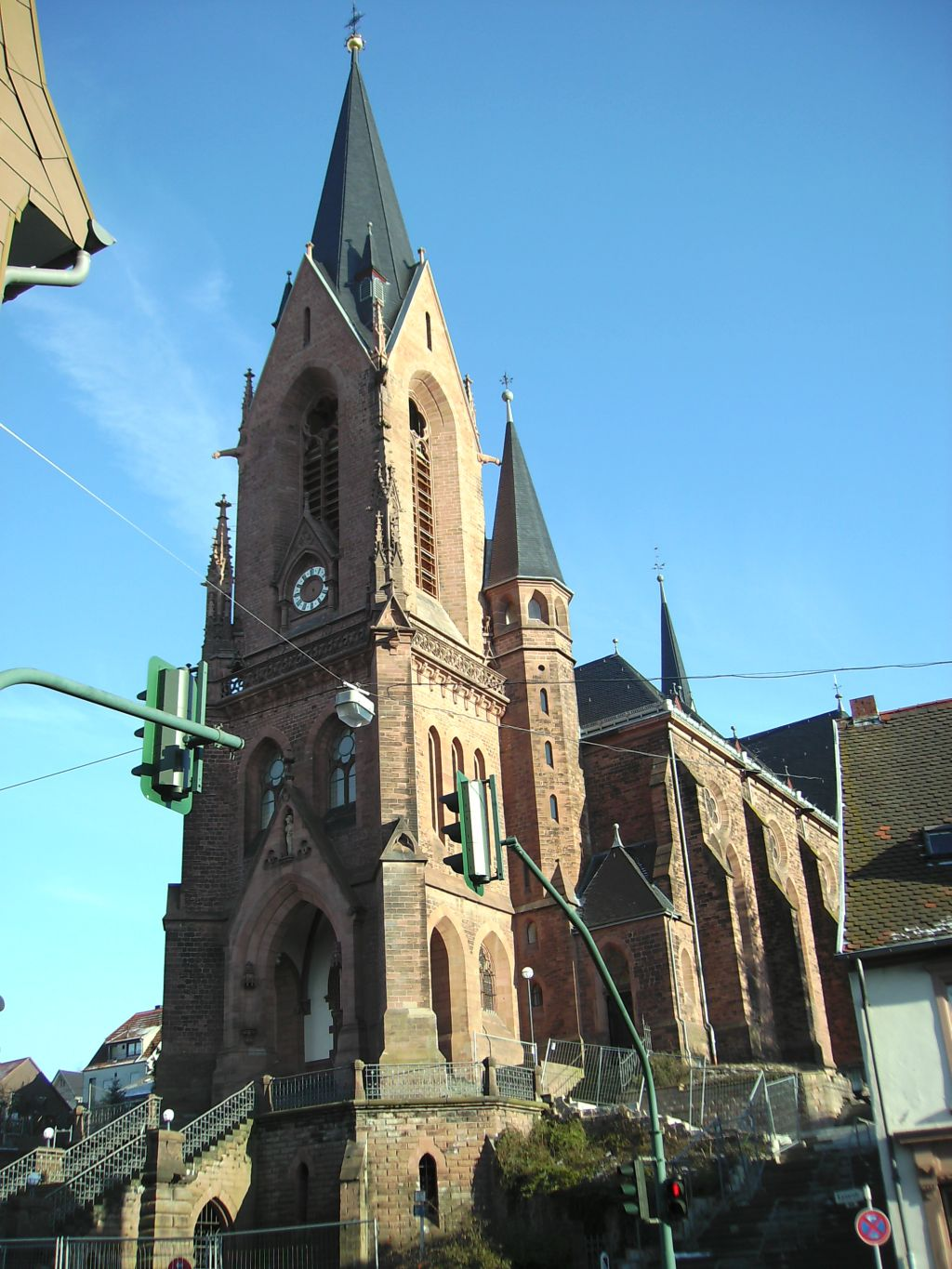 St. Ingbert: Josefskirche (nach Brand und Restaurierung 2011)